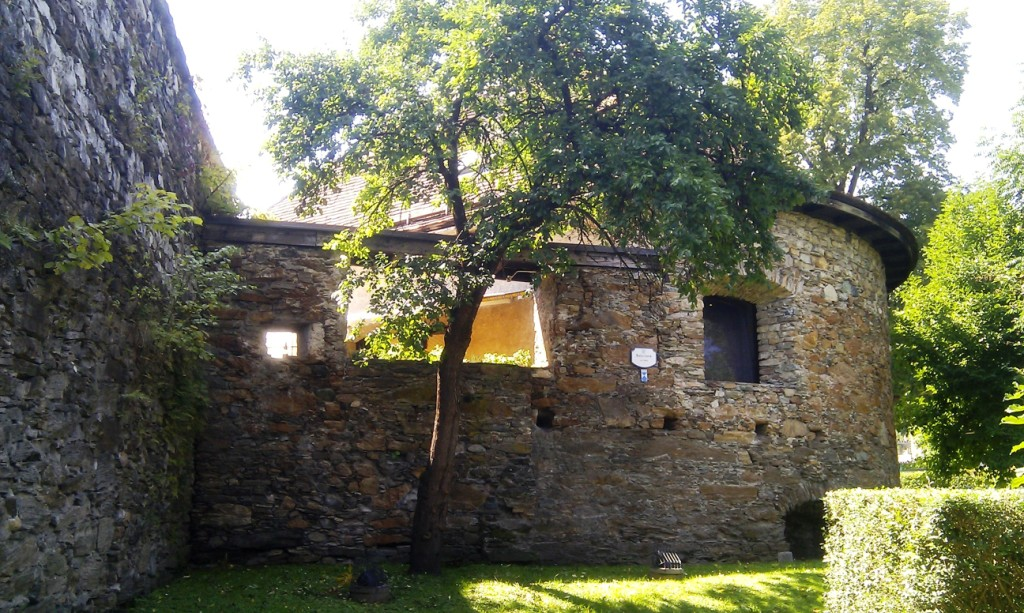 Basteiturm und Teil der Stadtbefestigung, Grabenstraße, Sankt Veit an der Glan